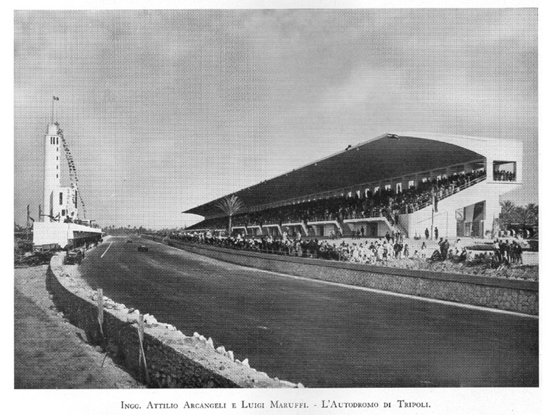 Tribune dell'Autodrono di Tripoli, 1935 L'immagine è tratta dalla rivista "Architettura", 1935 - XIII febbraio fascicolo II disponibile al link